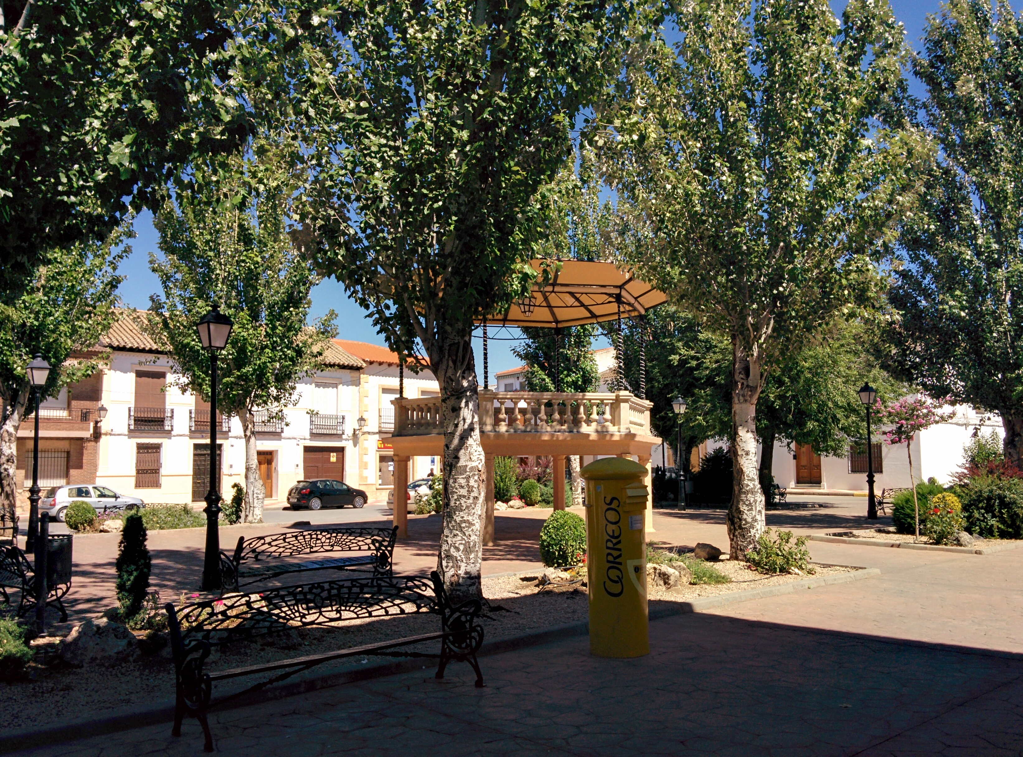 Plaza Mayor, en La Villa de Don Fadrique (Toledo, España).